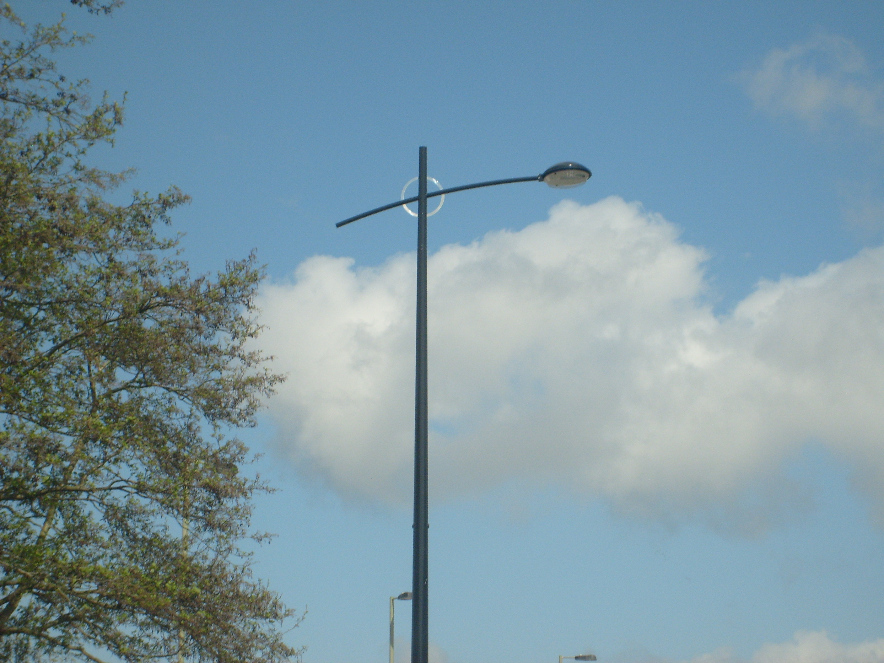 An Urbis lamppost.